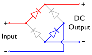 New diode bridge diagram